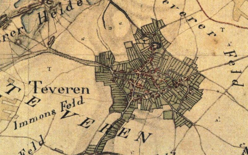 Kartenaufnahme der Rheinlande 1803-1820